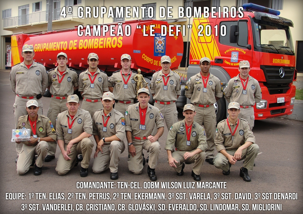 Equipe Campeã do Troféu Le Defi 2010 do Corpo de Bombeiros do Paraná.